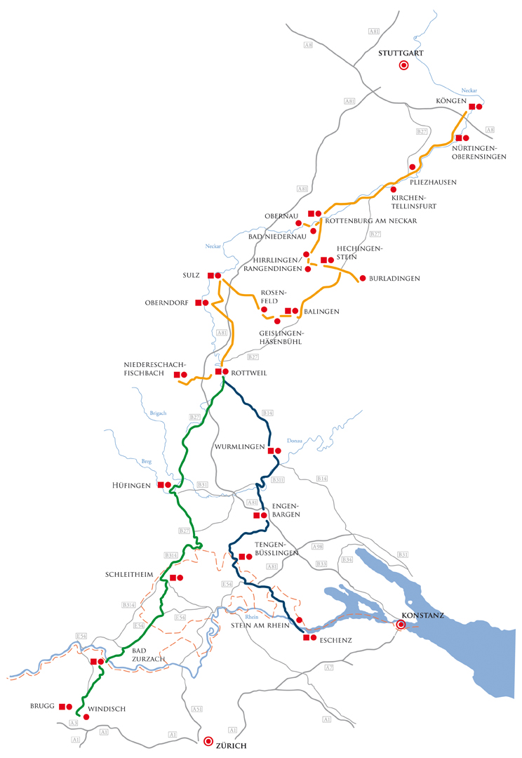 Übersichtskarte Römerstraße Neckar-Alb-Aare